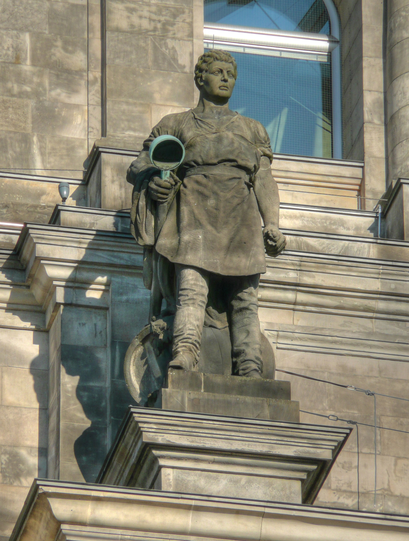 Steinplastik an der Westseite des Reichstagsgebäudes